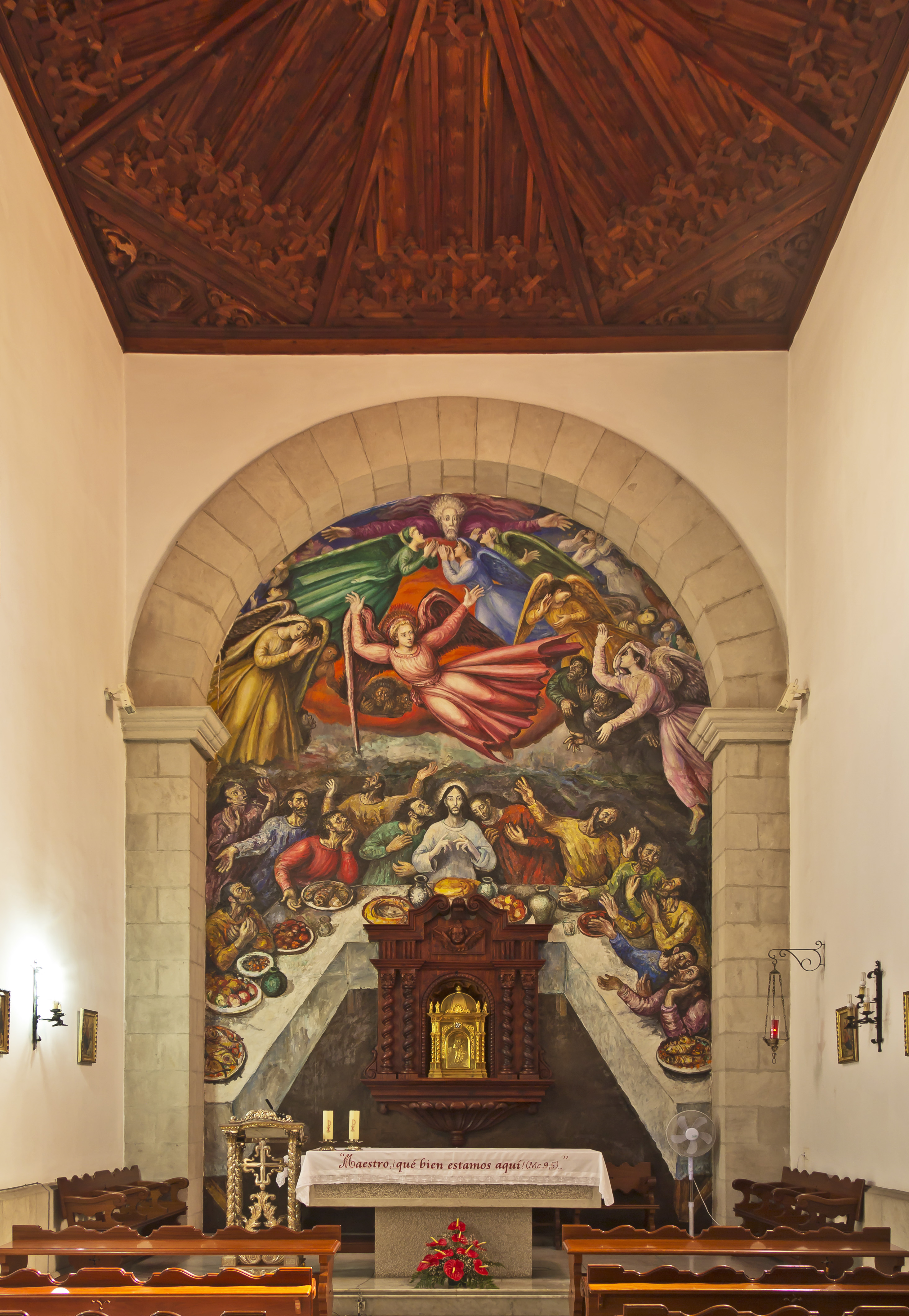 Kapelle des Allerheiligsten Sakraments, rechte Seitenkapelle in der Basilika der Jungfrau von Candelaria in Candelaria, Teneriffa, Spanien